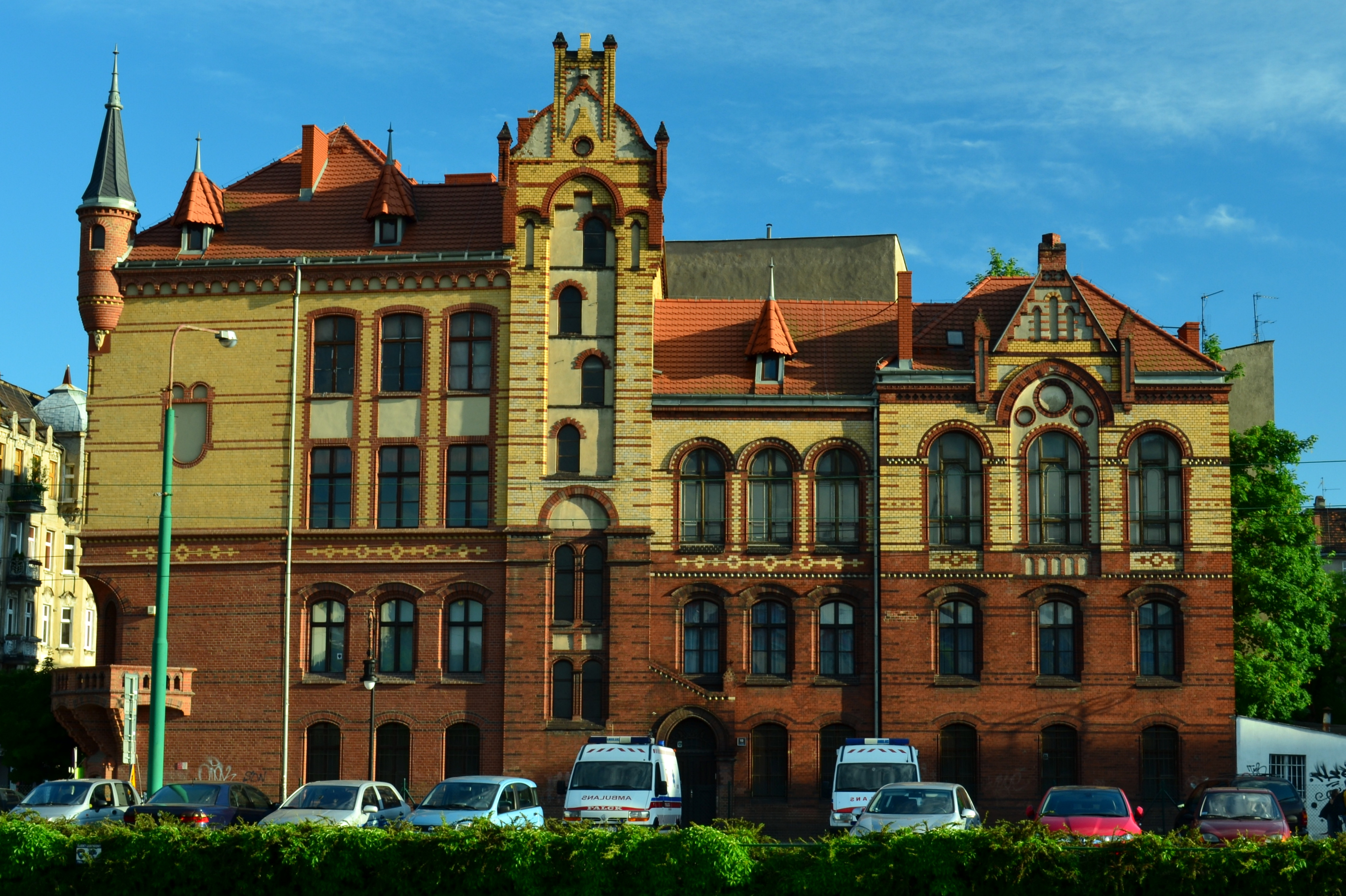 Poznań, kamienica gminy żydowskiej, 1897